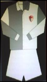 uniforme 1903